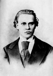 Анатолий Фёдорович Кони в молодые годы.